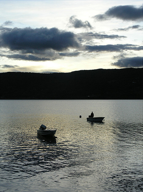 Sunset at Tominè